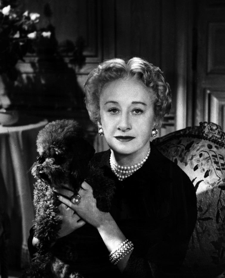 Photo of designer Hattie Carnegie.